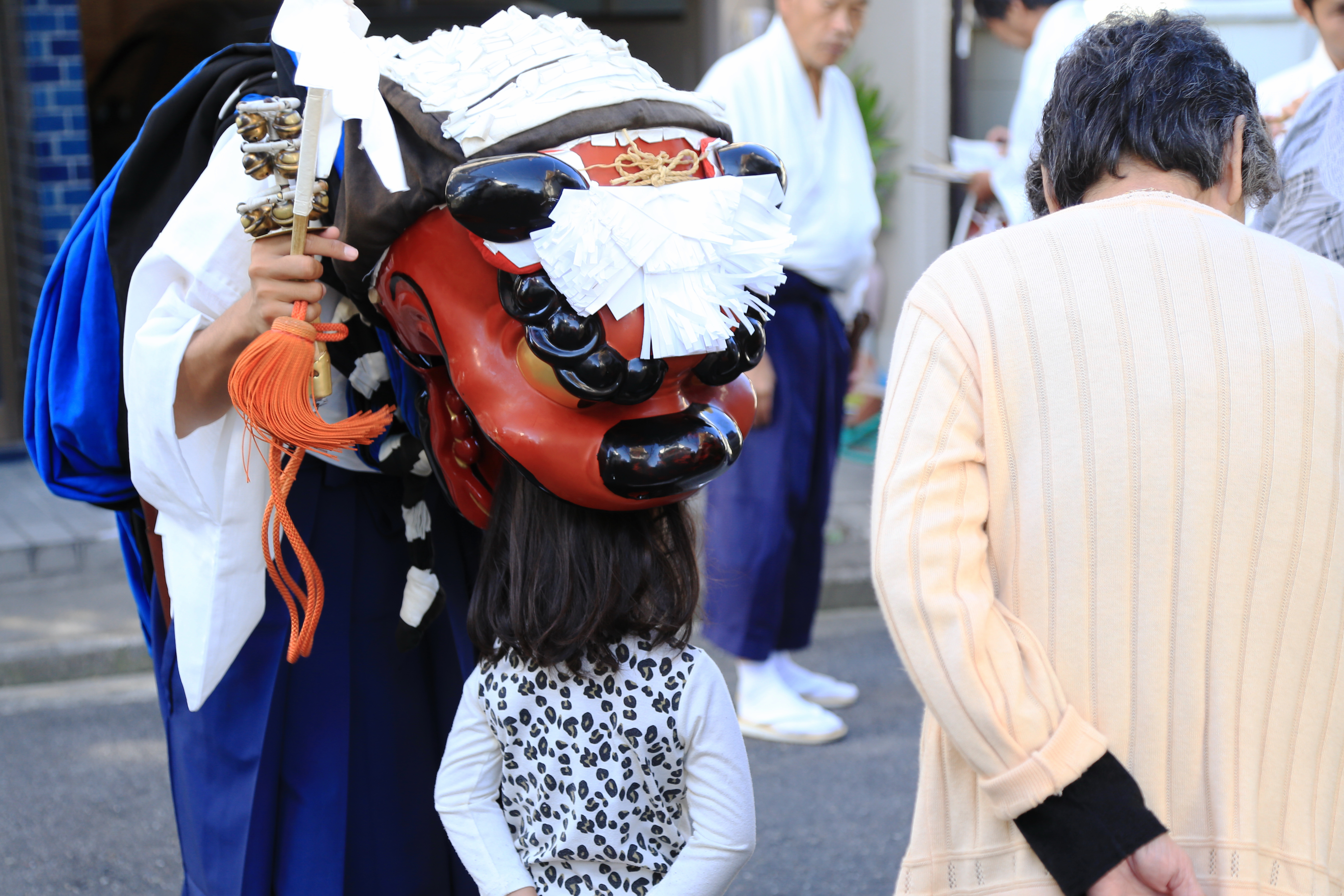 サムネイル|街道を行く伊勢の獅子舞